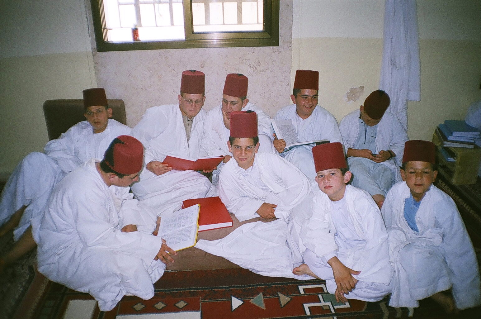 Young Samaritans